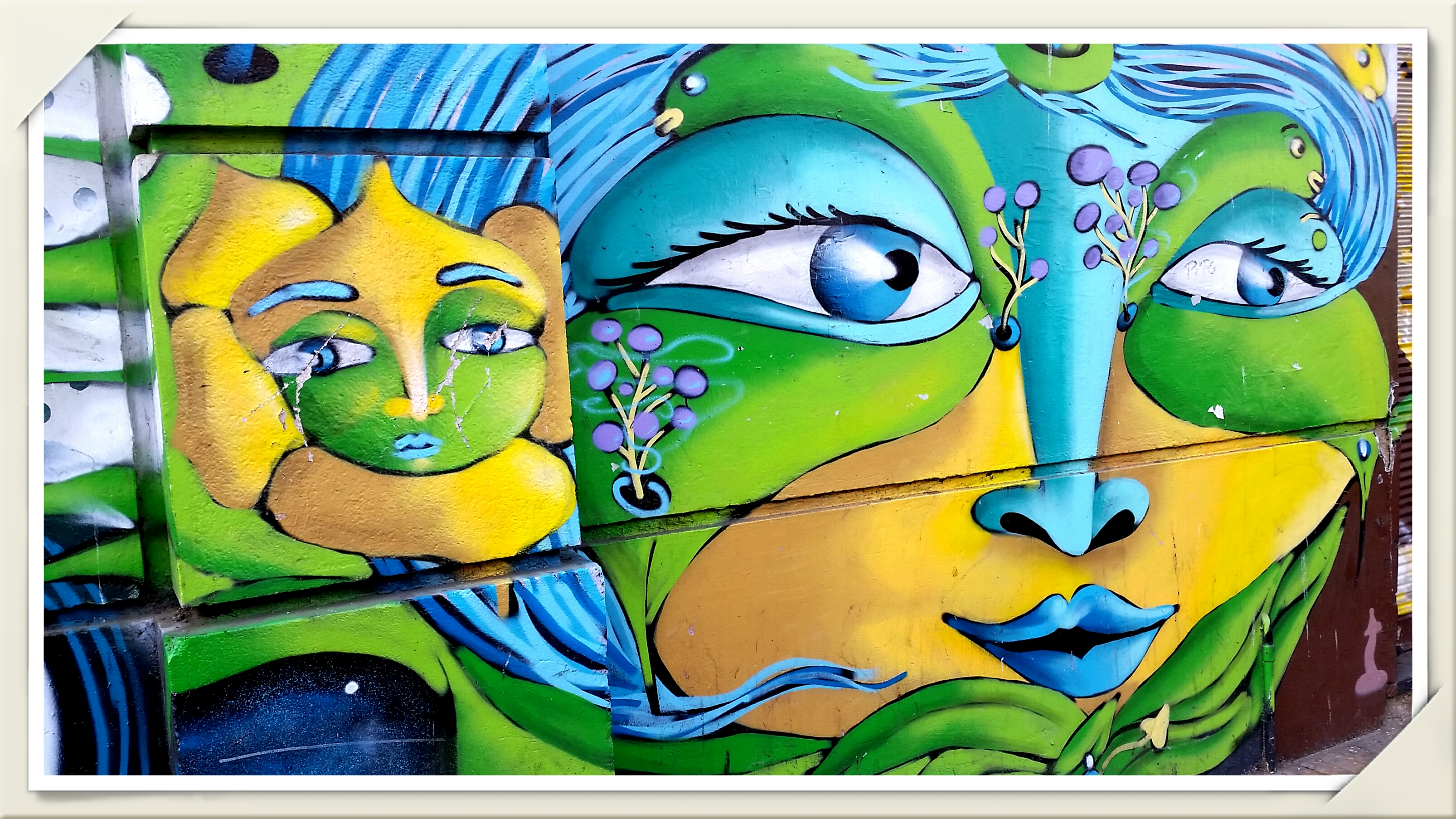 Murales en Valparaíso, Chile